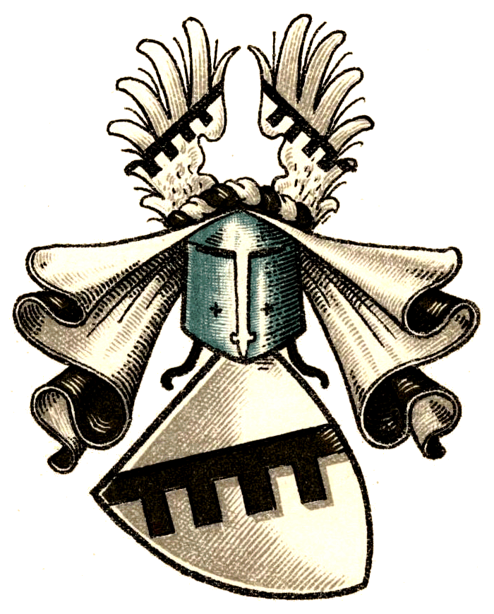 Wappen der von Grothus